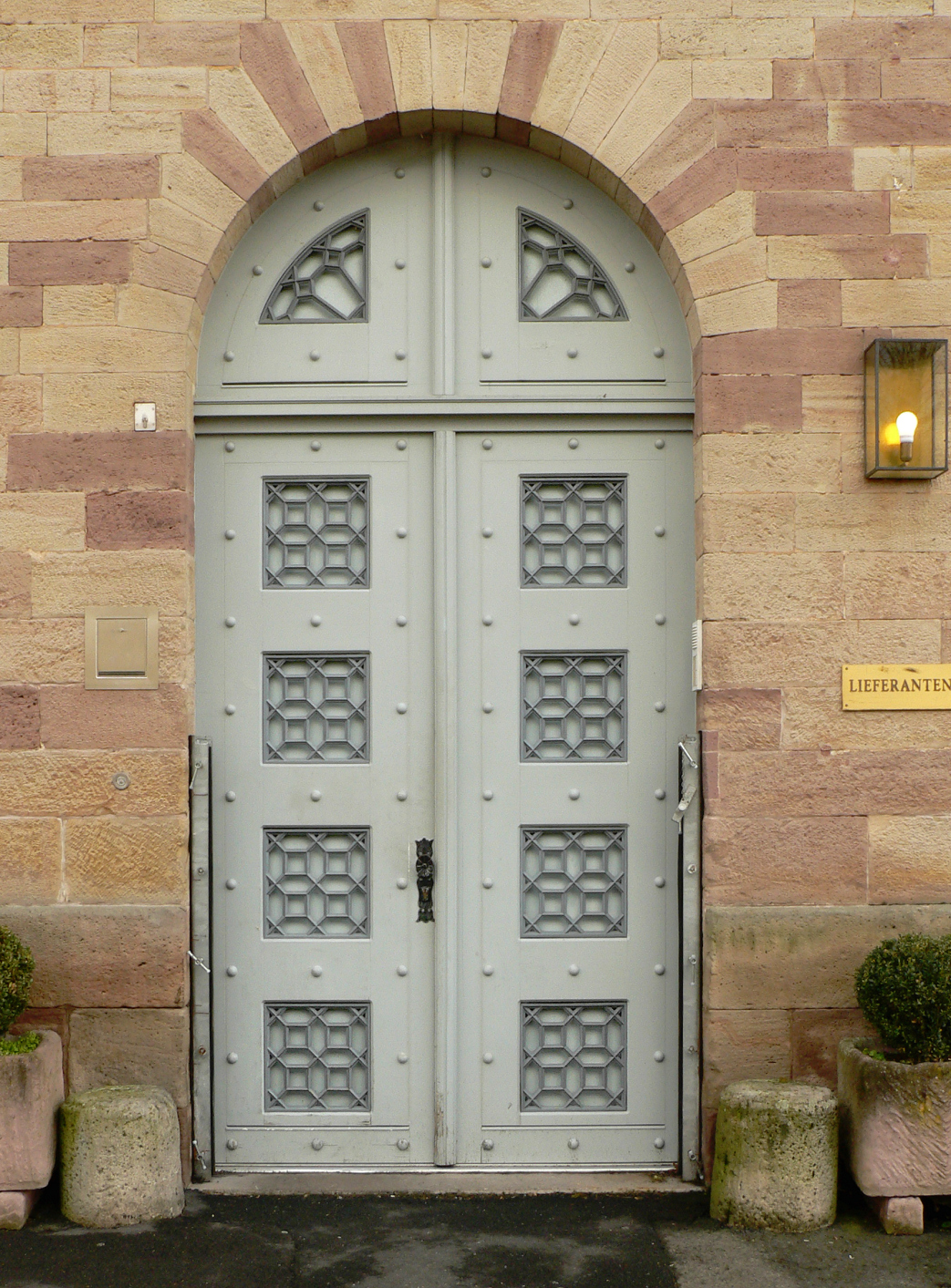 Alter Packhof, 1999 beim Umbau restaurierter Türeingang, gefüllt mit geometrischen Filigran aus Gusseisen der Eisenhütte in Veckerhagen